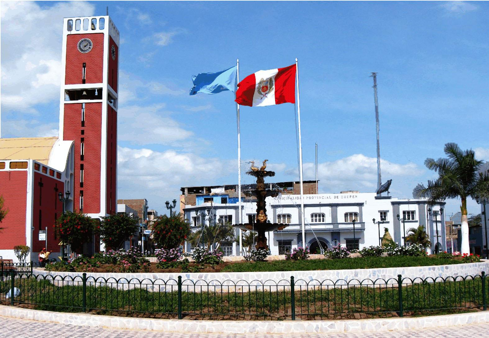 Plaza de Armas de Chepén